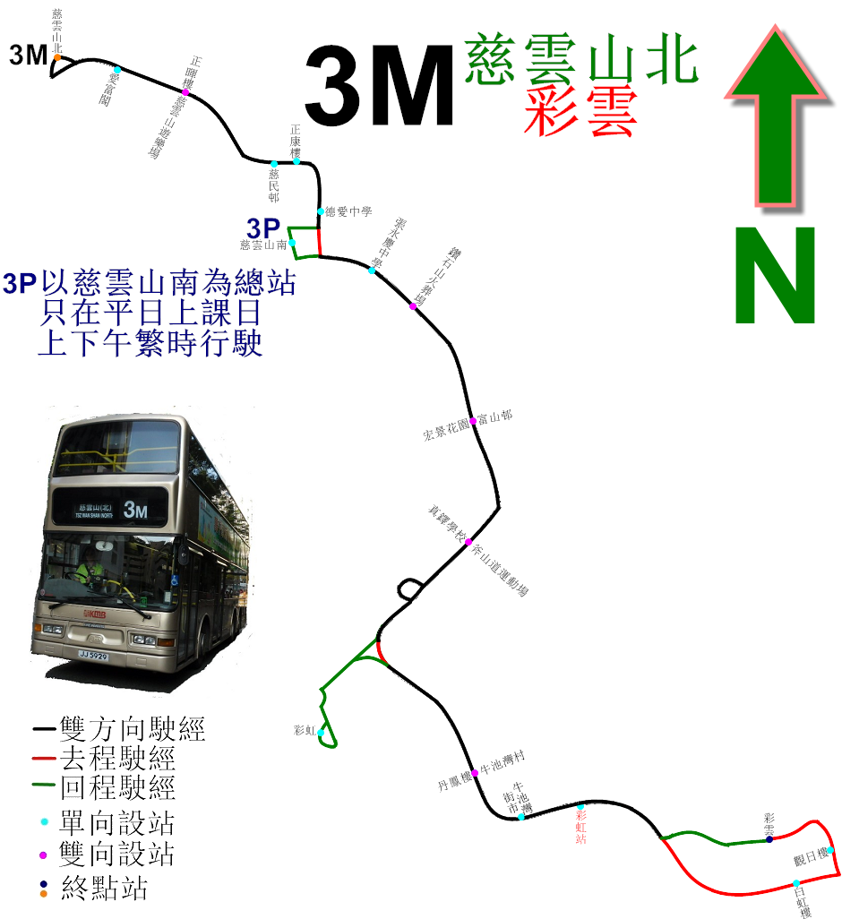 中文（香港）: 九巴3M線的走線圖